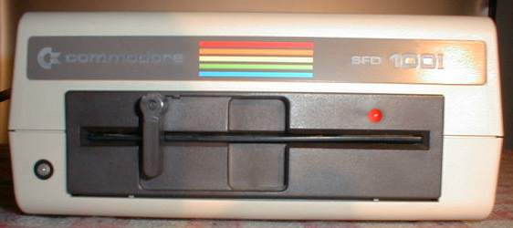 Commodore SFD 1001 Disk Drive